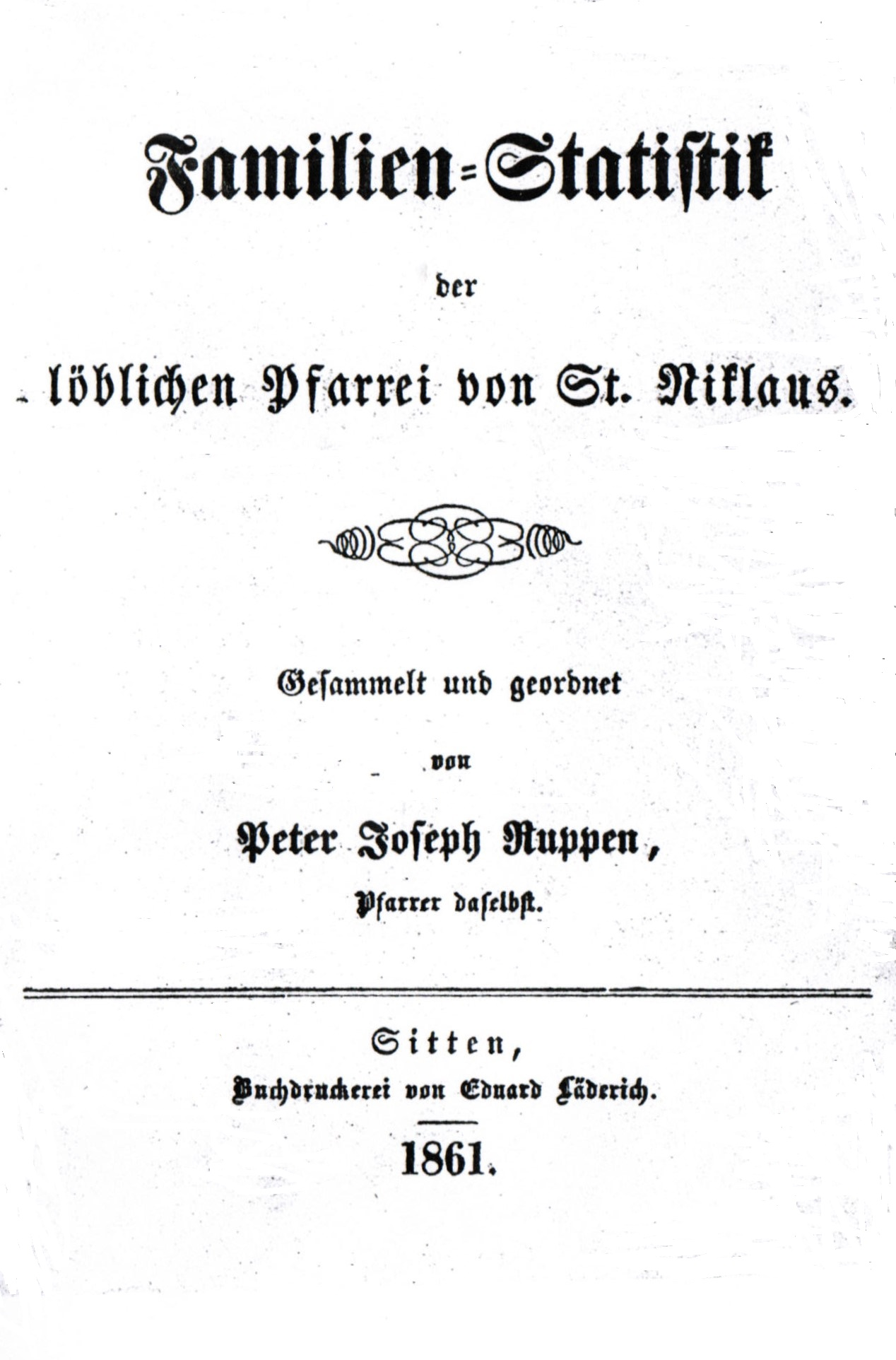 Altestes Ortsfamilienbuch der Welt, Familienstatistik der Pfarrei St. Niklaus, Wallis, Schweiz, Ausgabe 1861, 134 Seiten.